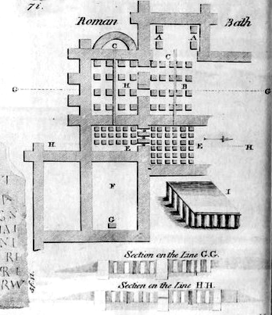 Befundskizze der römischen Therme von Netherby (GB), erstellt 1732-1745.